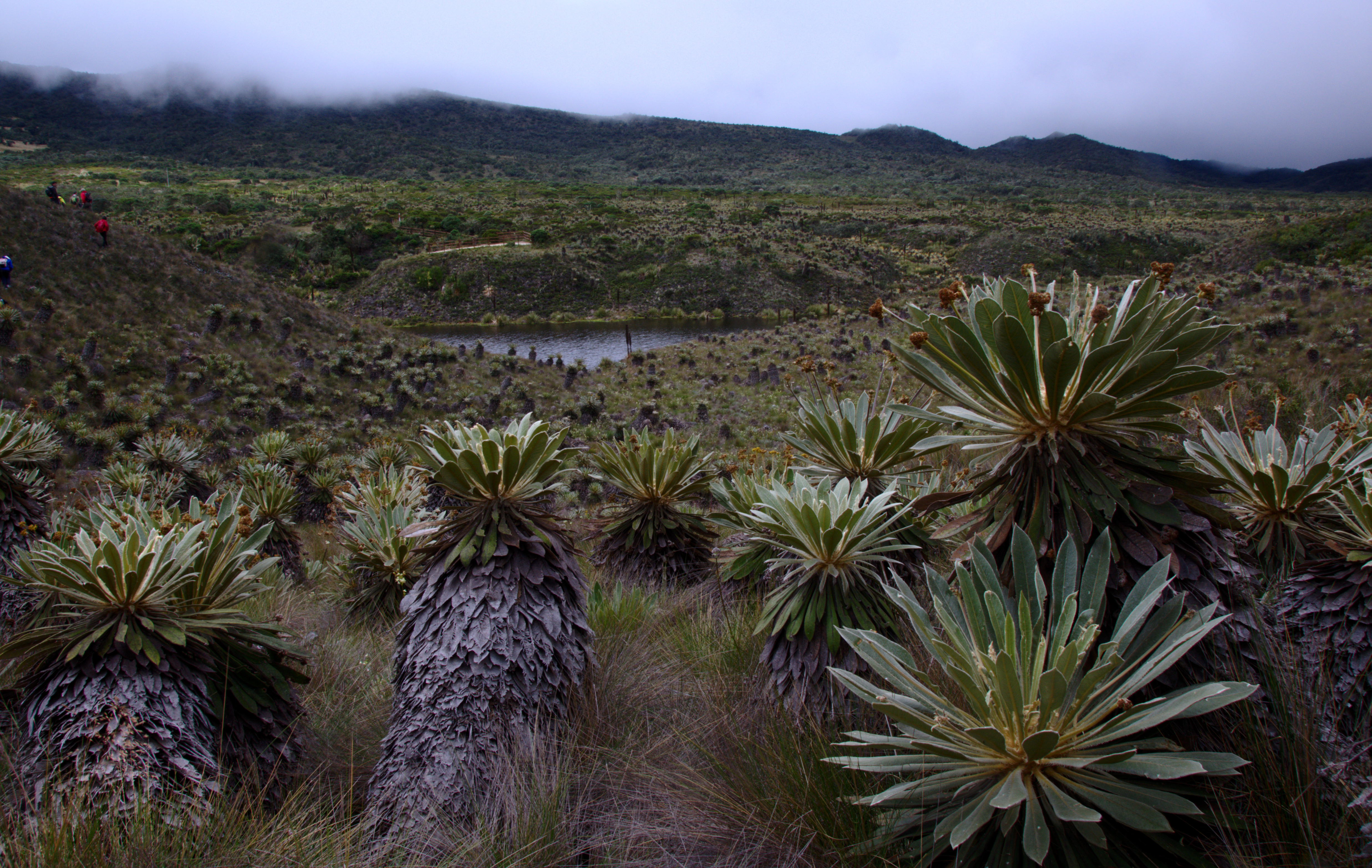 Páramo de Guacheneque